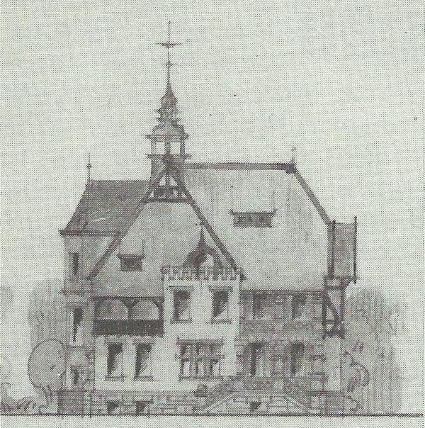 Burg Arntz, Lohfelder Straße 122/124, Bad Honnef-Lohfeld: Entwurf zum Bauantrag 1903, Bauzeichnung